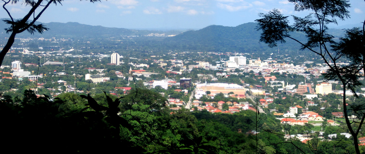 Panorámica general de San Pedro Sula, tomada en la tarde del 17 de Septiembre de 2007 desde el sector de La Primavera en El Merendón